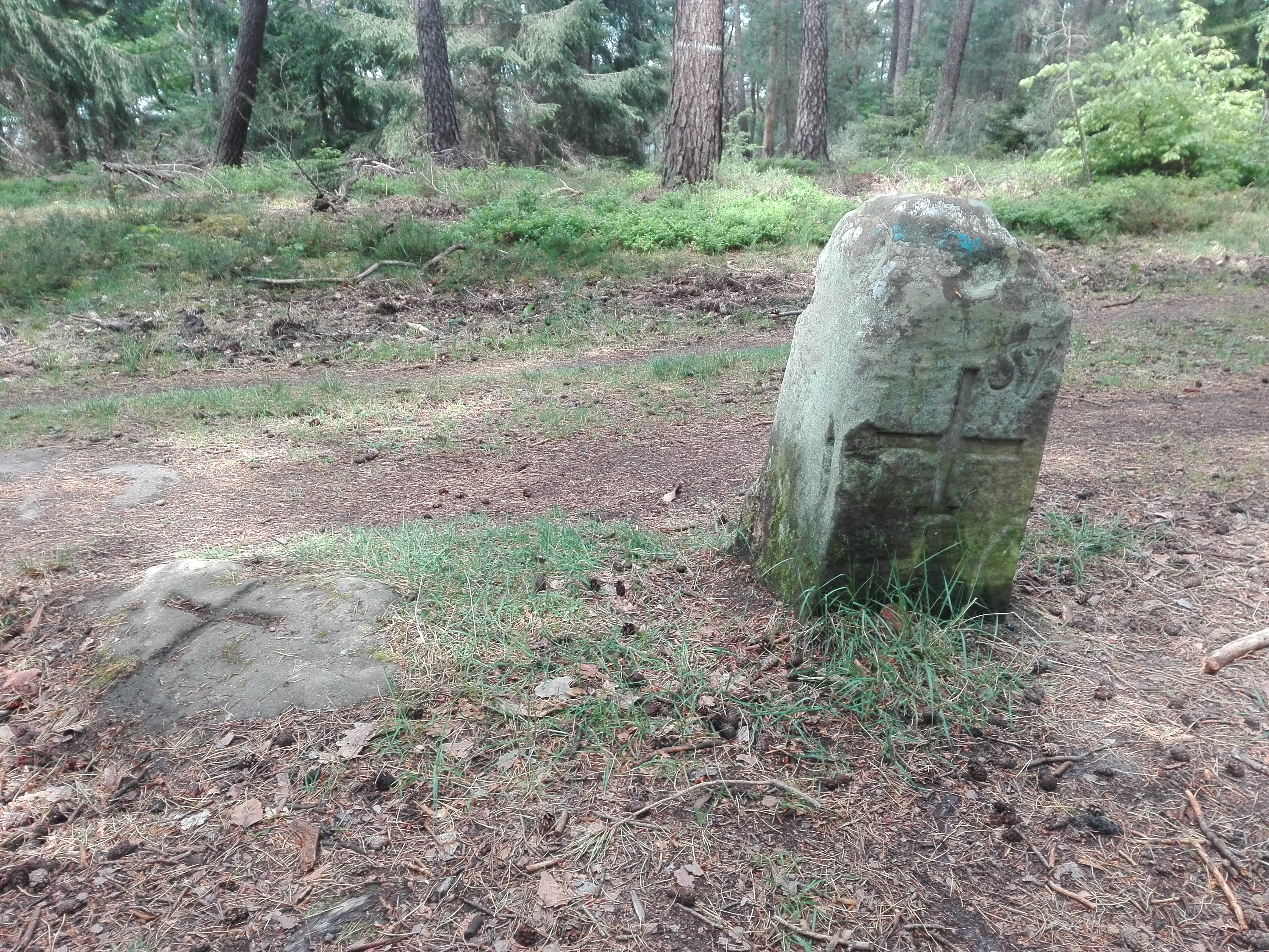 Weinbiet-Stein auf dem Weinbiet. Er markiert die Grenze Deidesheims zu Gimmeldingen